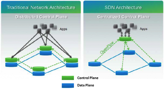 Монгол: Silver1-550x304